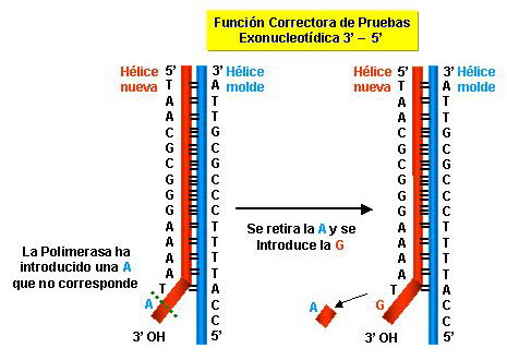 Función correctora exonucleasa de la Pol III de E. coli (2)